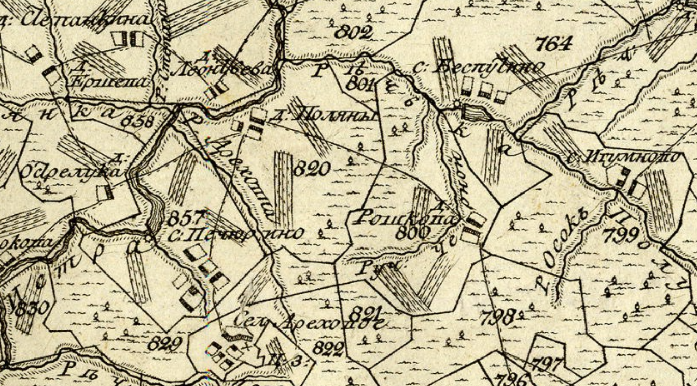 Церковная земля, где была церковь Воскресения Христа (Калужская область) 801